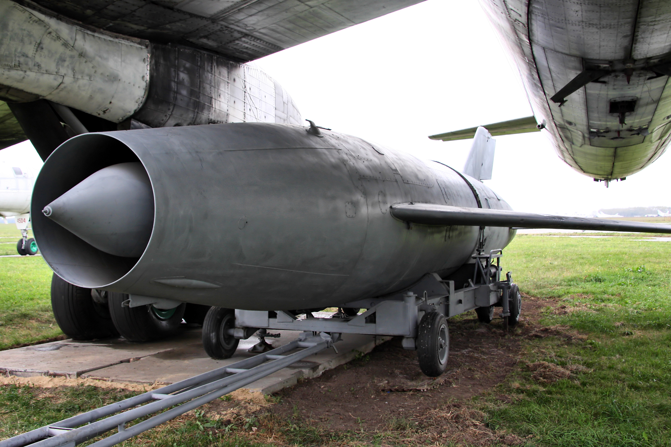 Авиационная крылатая ракета Х-20М (Kh-20M missile)